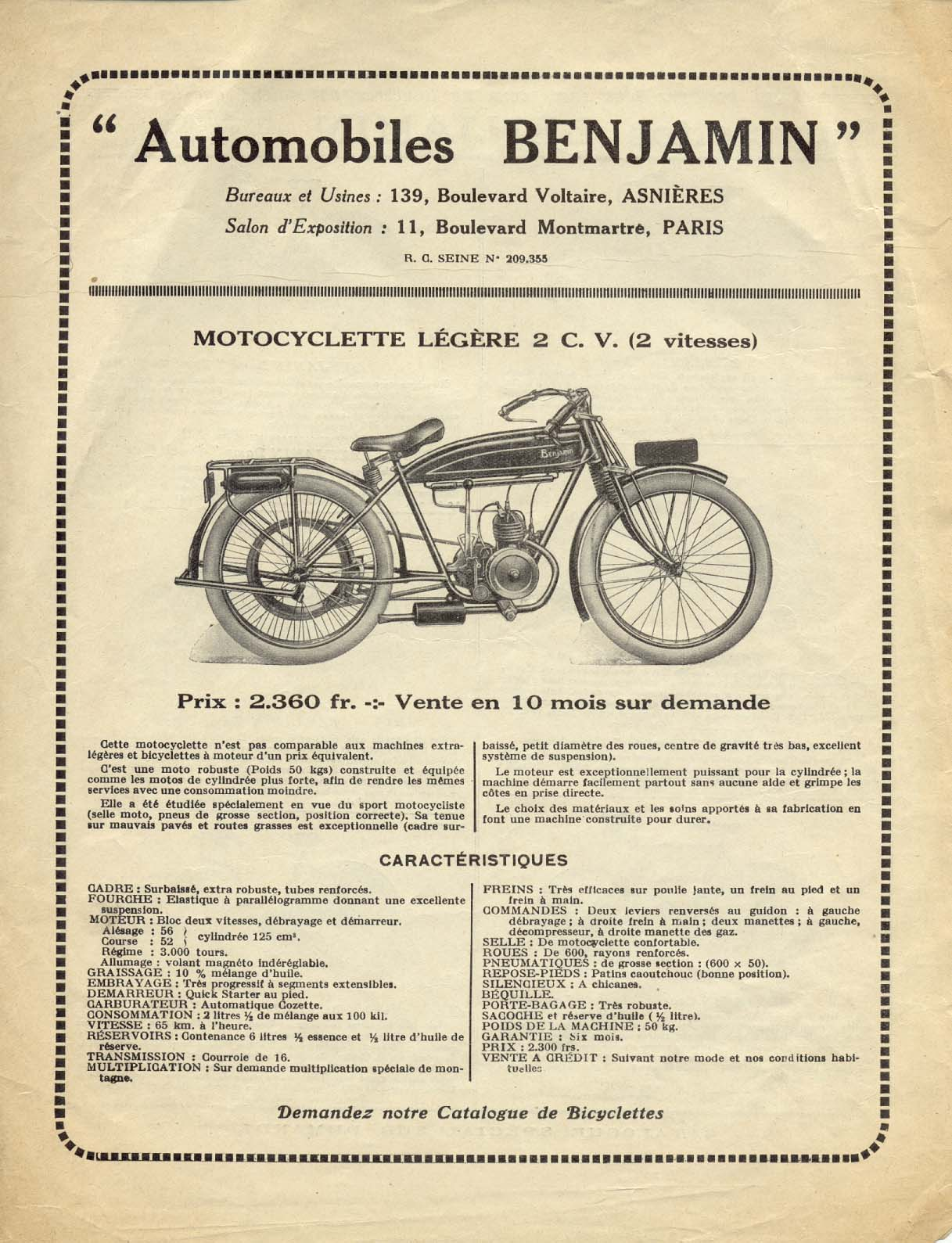 Afbeelding is meer dan zestig jaar oud Reclame poster uit jaren 1920-1930, was dus "in opdracht", waardoor auteursrecht inmiddels verlopen is.